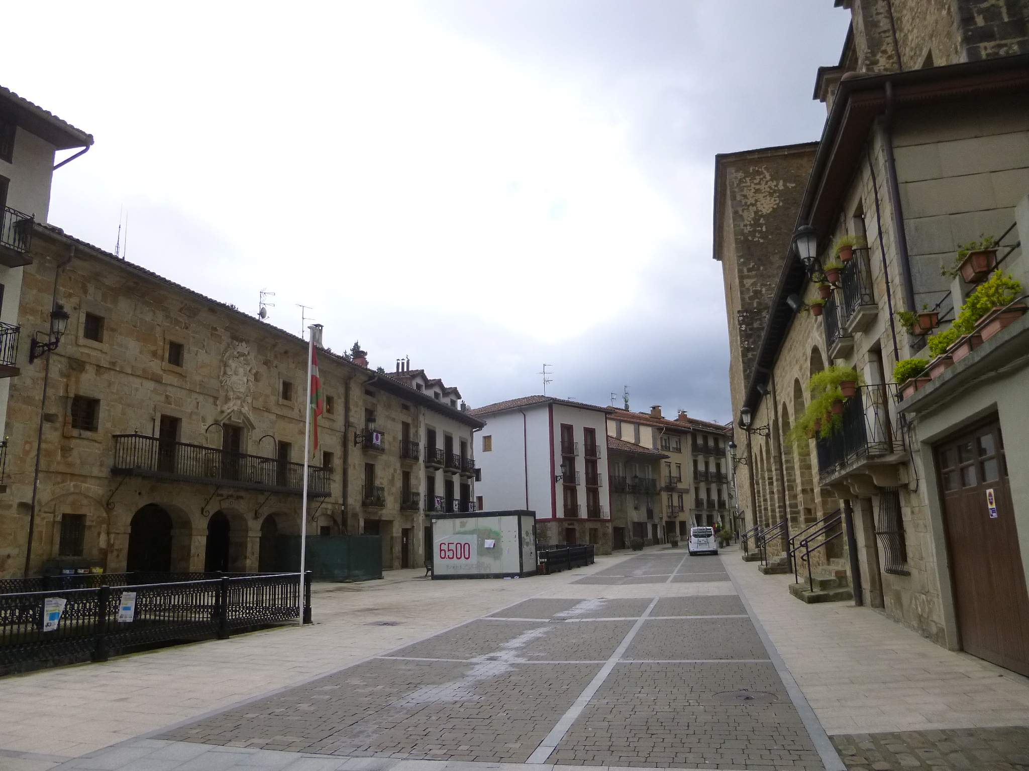 Antzuola (Gipuzkoa)